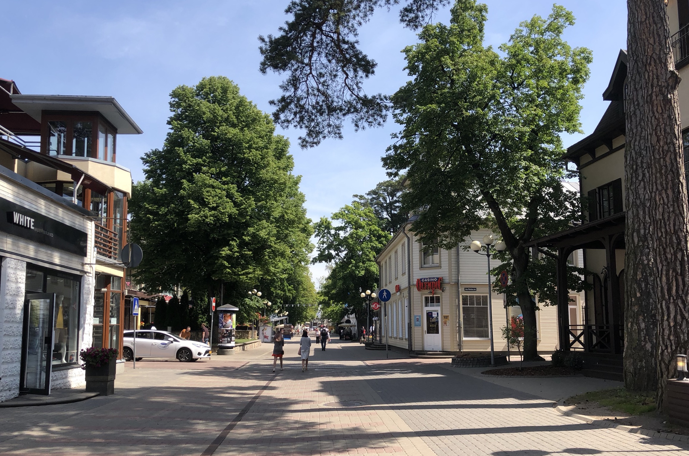 Johmenstraße in Riga-Strand